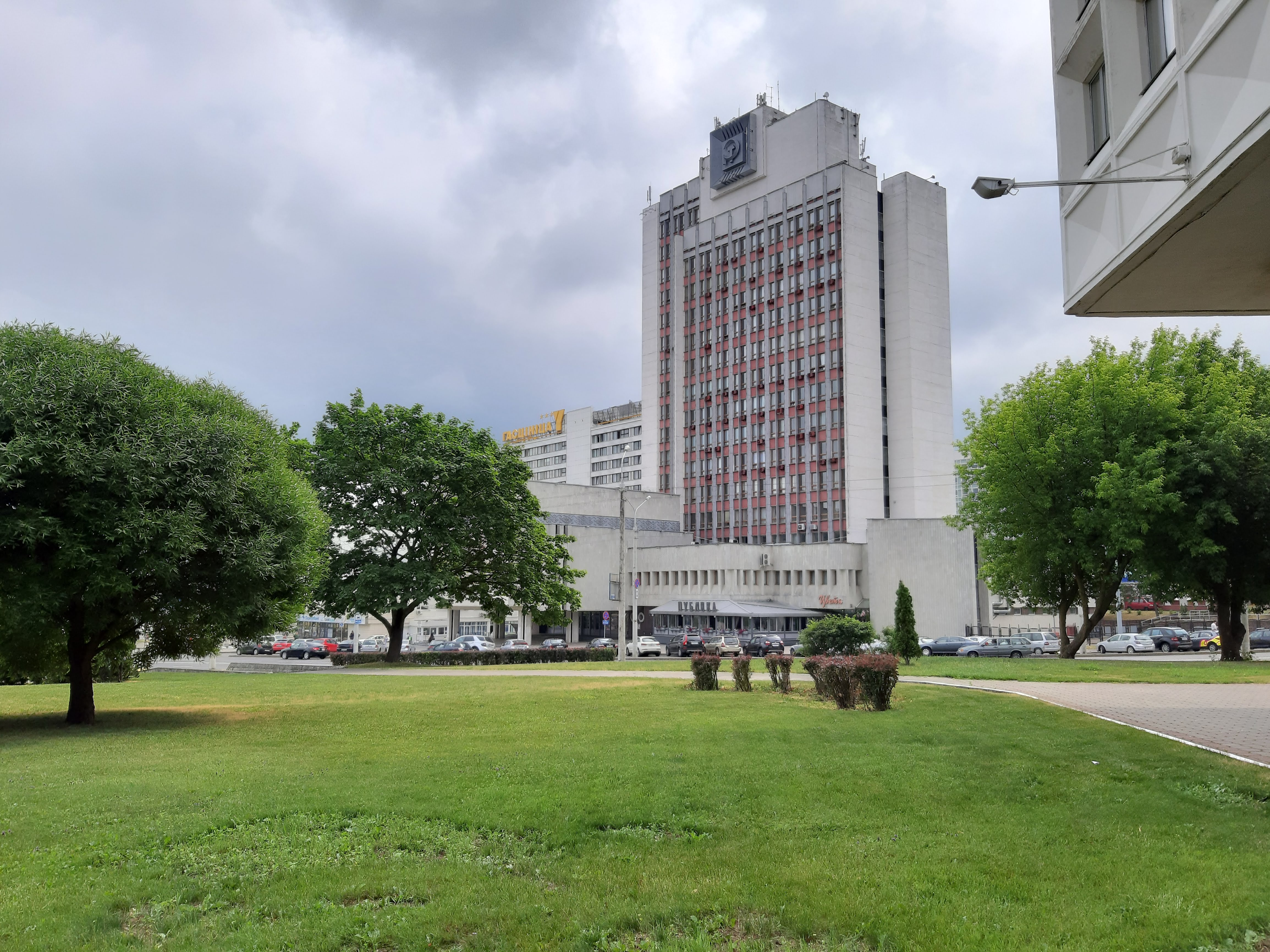 Мінск. Мельнікайтэ пасля завяршэння станцыі метро